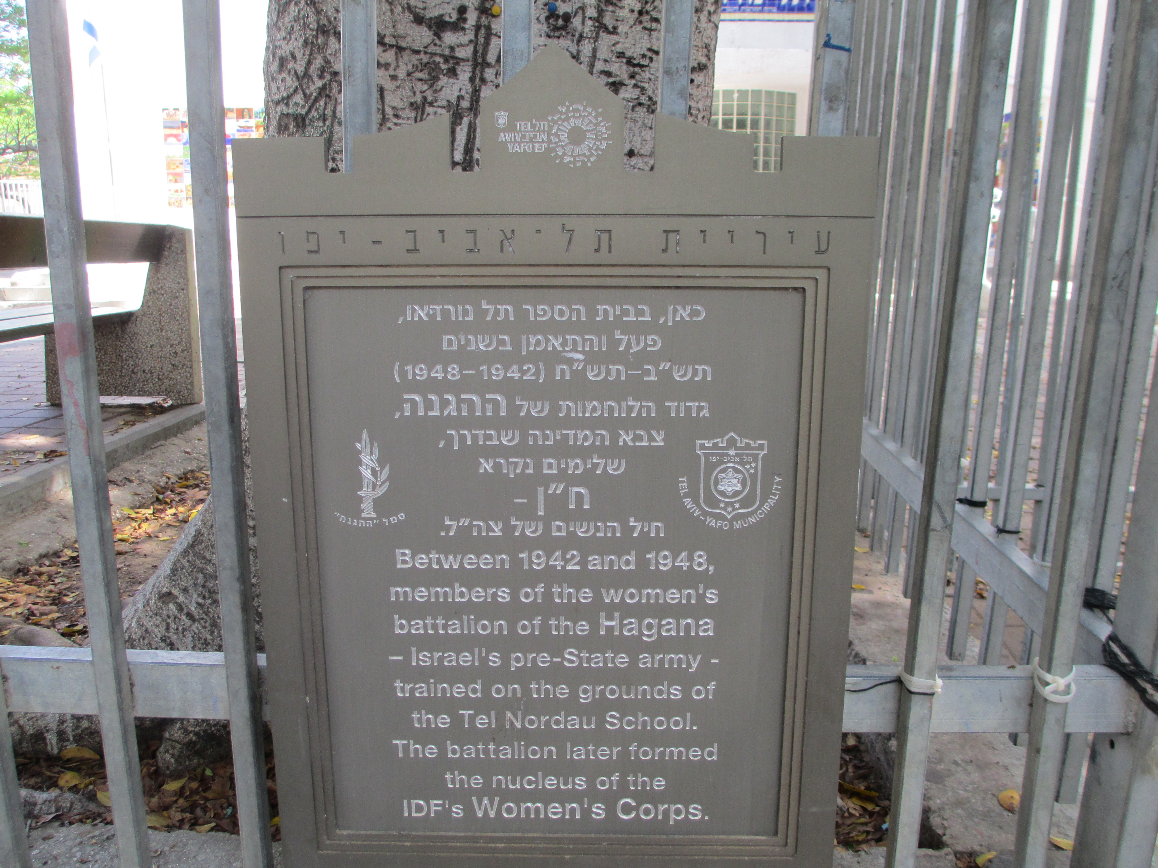 לוחית זיכרון בבית ספר תל נורדאו לגדוד הלוחמות של ההגנה